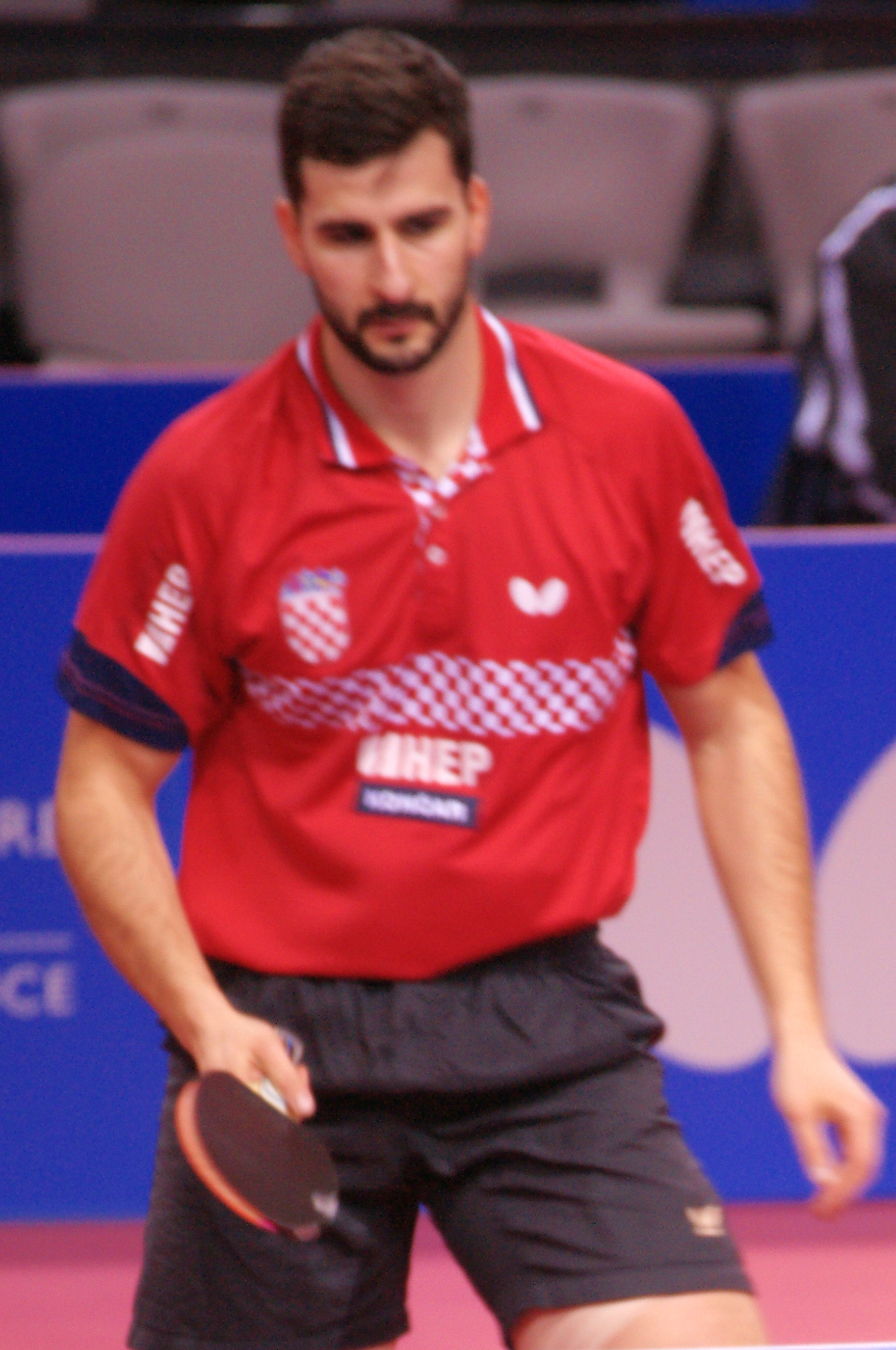 Andrej Gaćina, Top 16 Antibes 2017